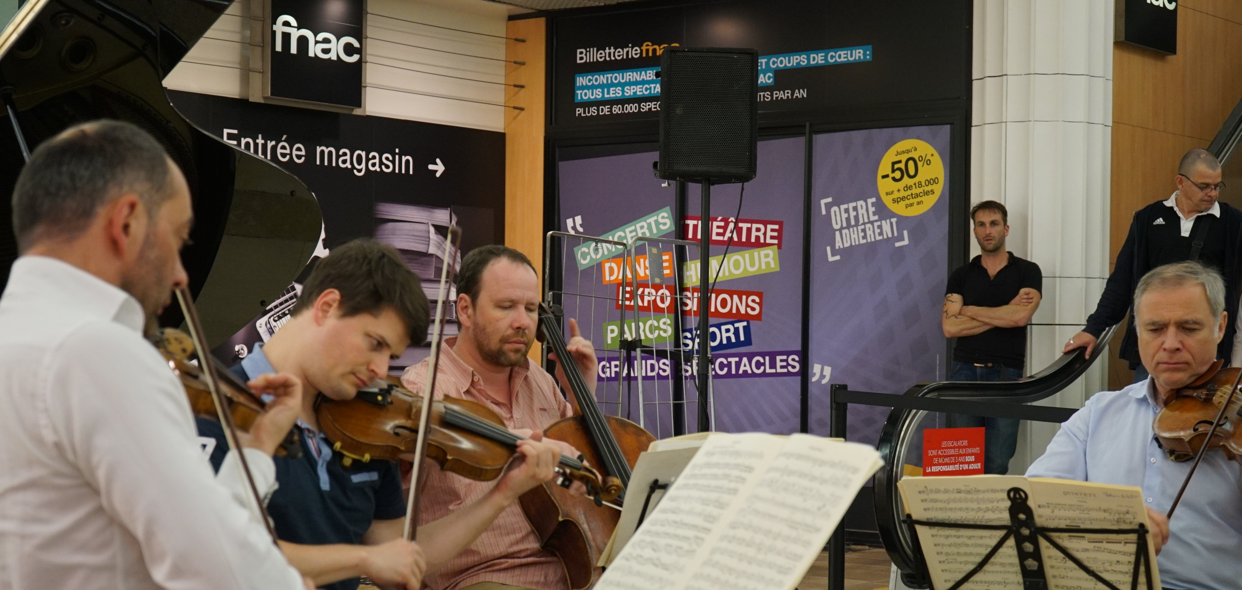 lors de "Flâneries musicales " de 2015.